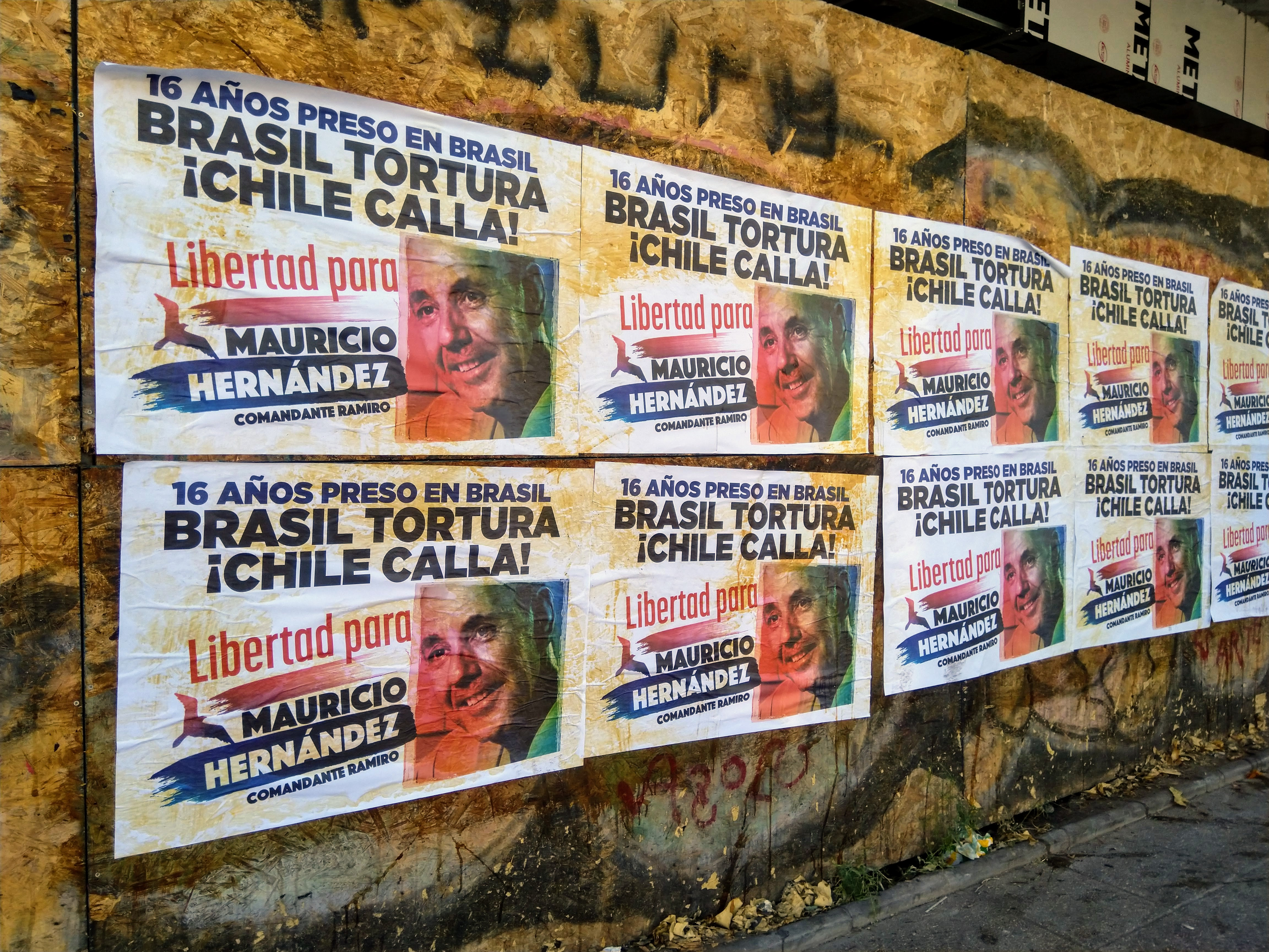 Afiche que pide la libertad de Mauricio Hernández Norambuena exjefe del Frente Patriótico Manuel Rodríguez (FPMR), ex organización armada terrorista de Extrema izquierda en la que se le conocía como comandante Ramiro.